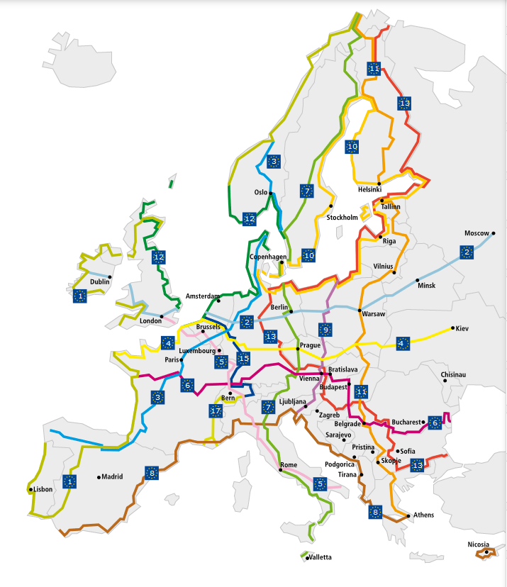 Carte des itinéraires EuroVelo au 12/07/2018 (à consulter sur le site